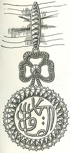 Huisorde van de Husainid